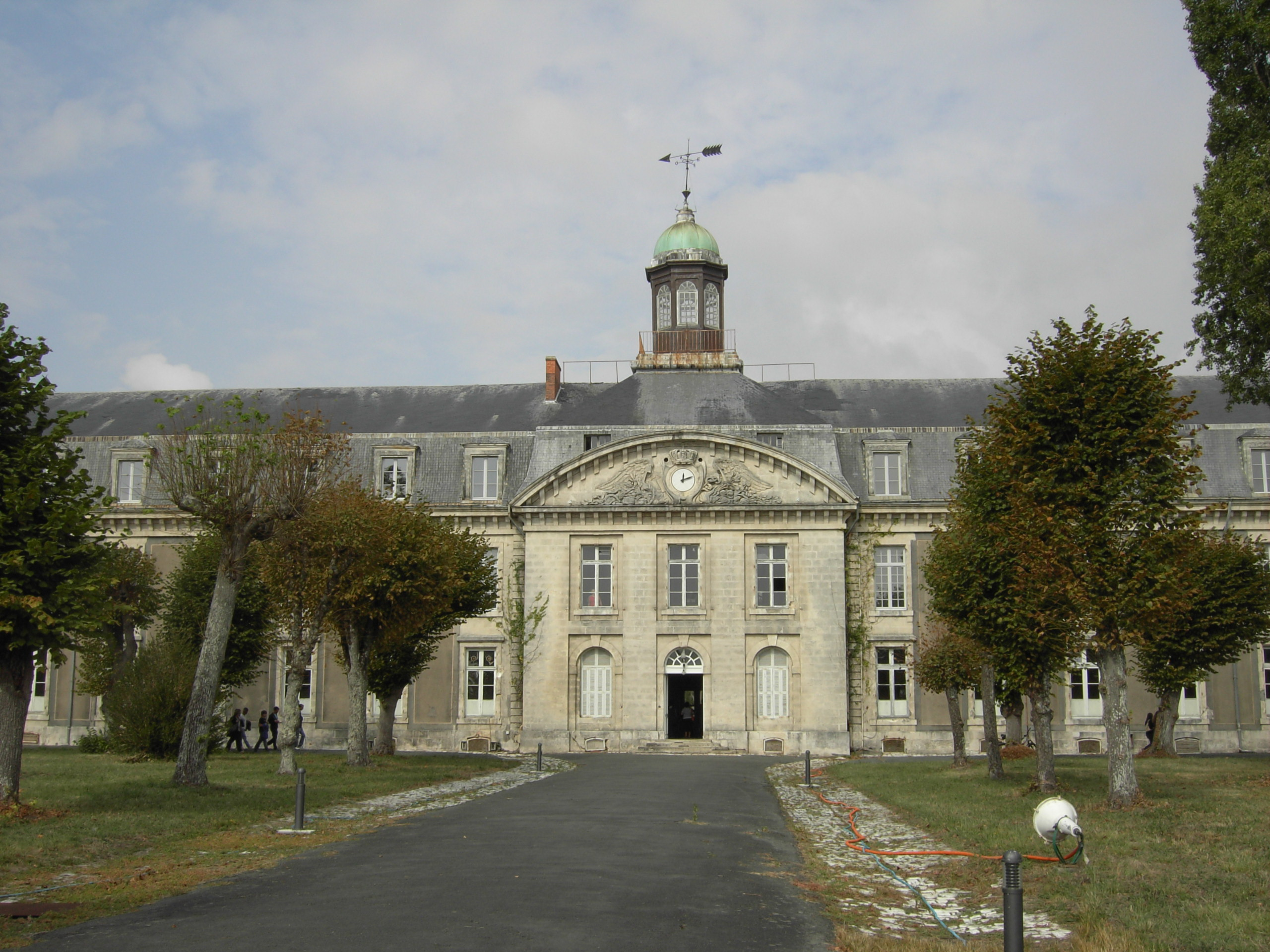 Bâtiment principal de l'hôpital de la Marine de Rochefort (17300).